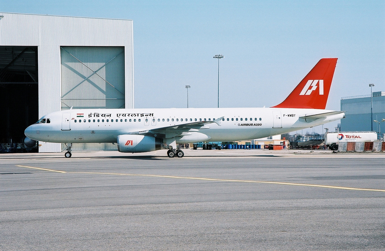 Photo prise à l'aéroport de Toulouse-Blagnac (LFBO) en France. Picture take at Toulouse-Blagnac Airport (LFBO) in France.